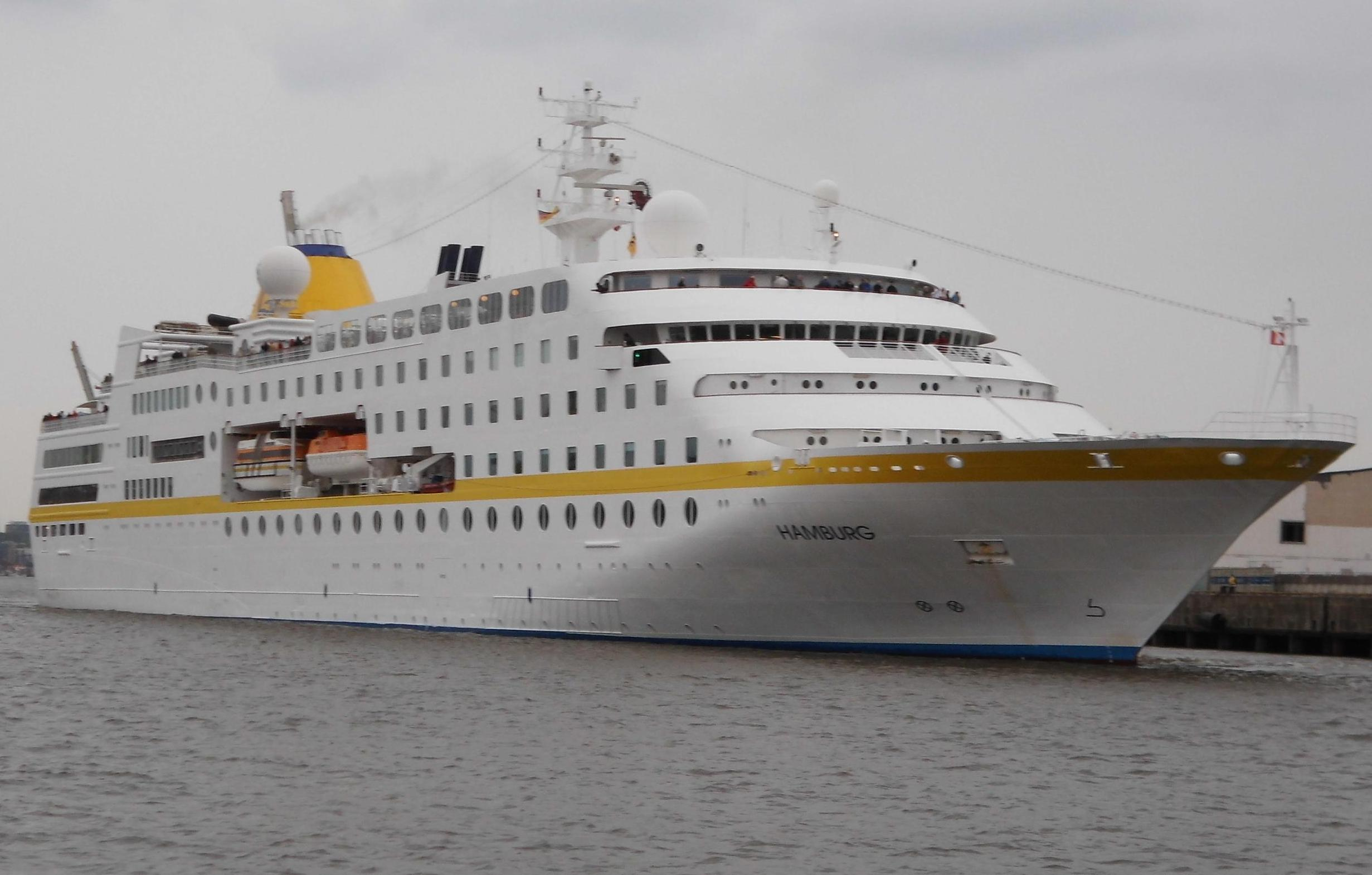 Hamburg beim Hafenfest 2013